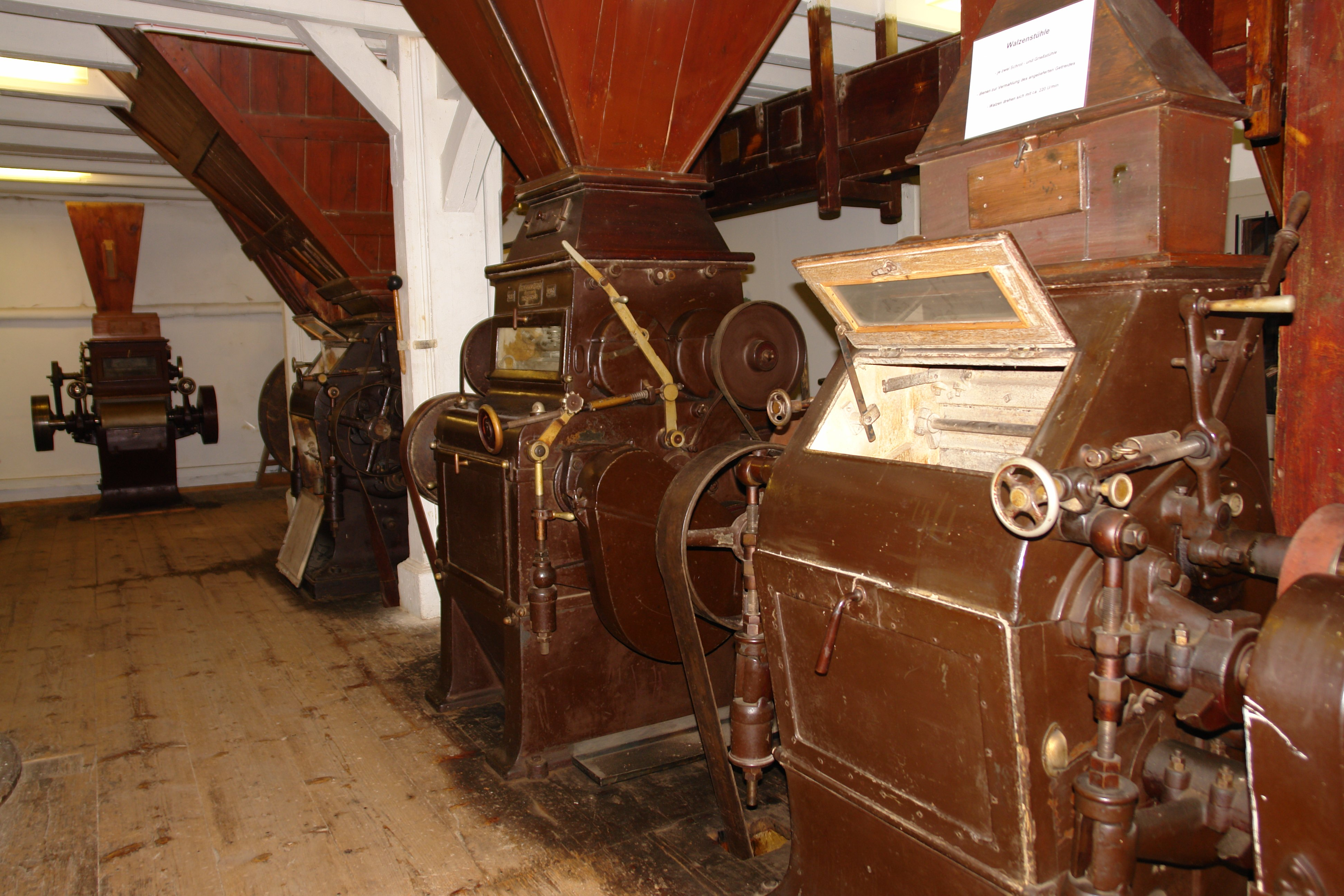 Walzenstühle einer historischen Mühle in Erfurt